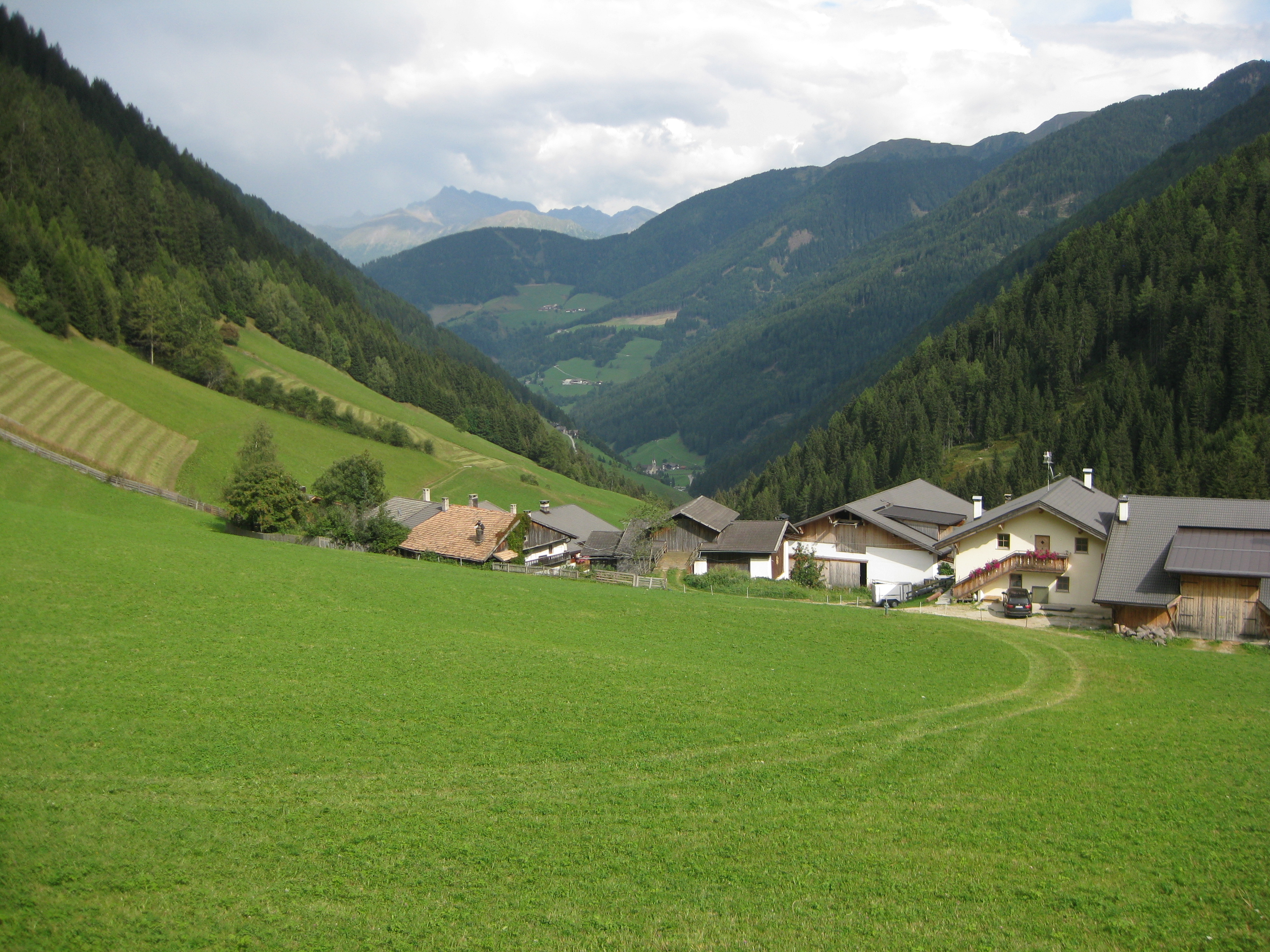 Das Jaufental in der Gemeinde Ratschings, Südtirol. Standort nahe dem Talschluss